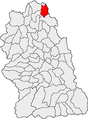 Categorie:Hărţi ale judeţului Hunedoara